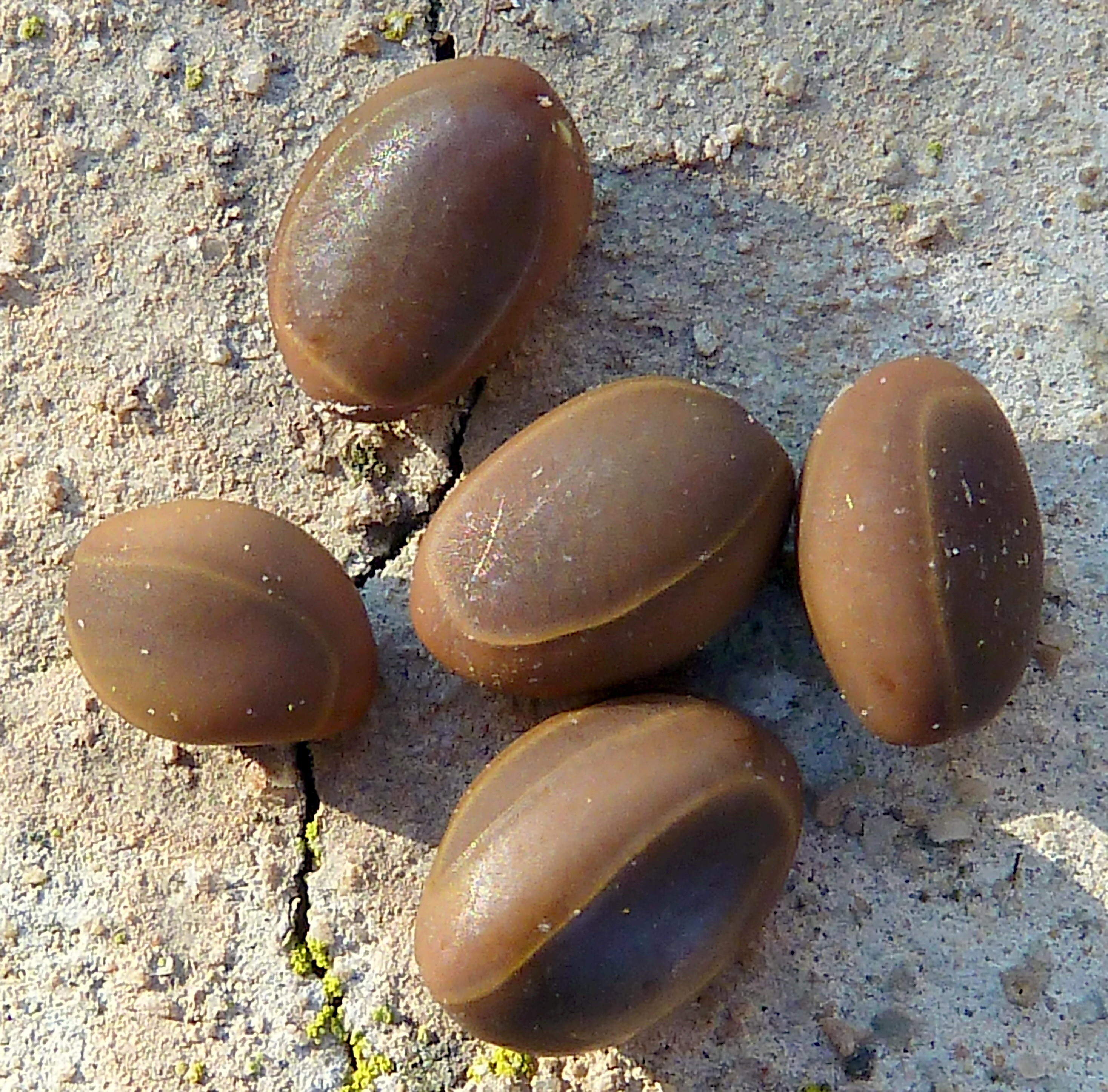 Acacia farnesiana: semillas libres - Albatera (Alicante, España)